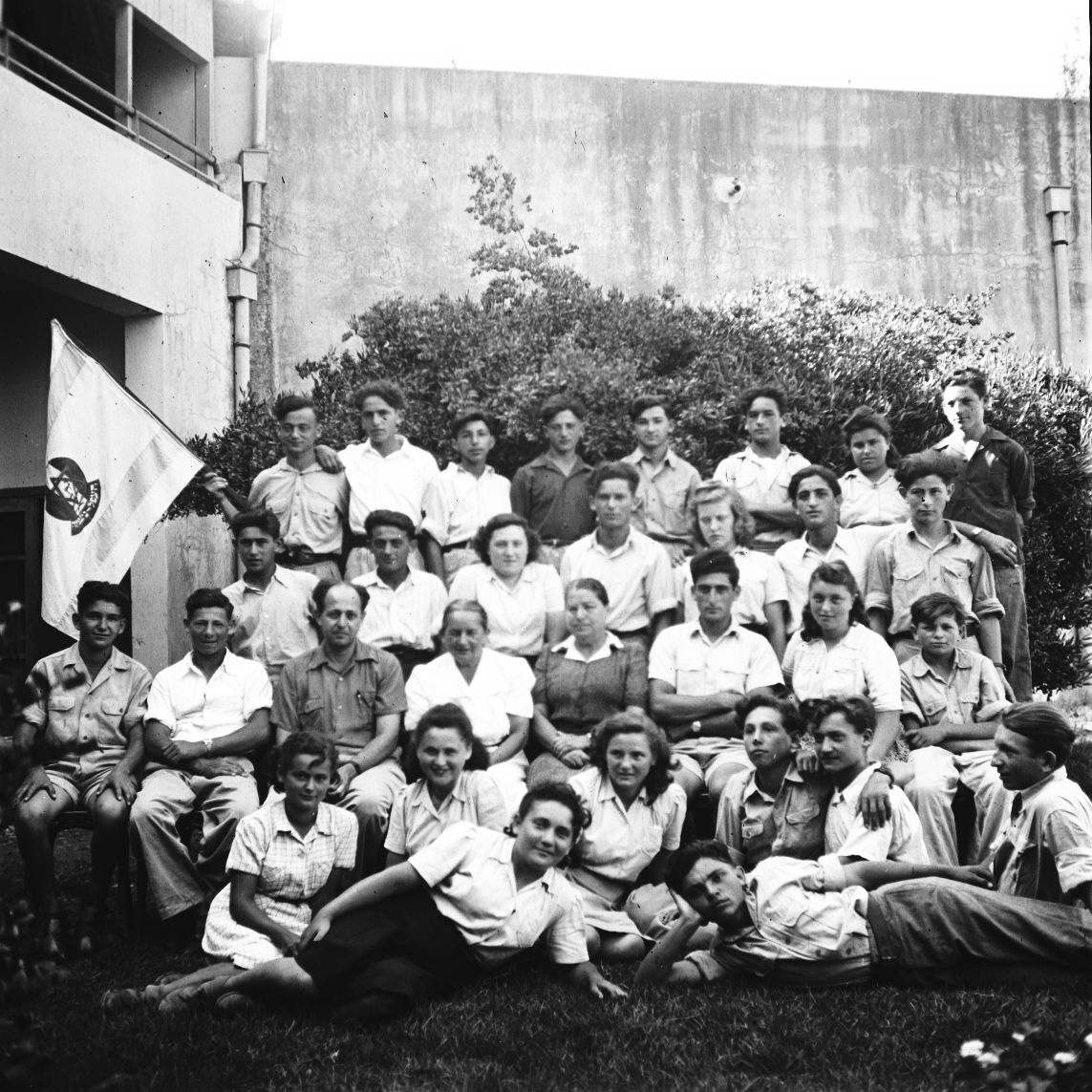 אוסף צילומים של הצלם זולטן קלוגר טווח מספרי התשלילים 23208 - 28209: ויצו - נהלל, קבוצת נוער